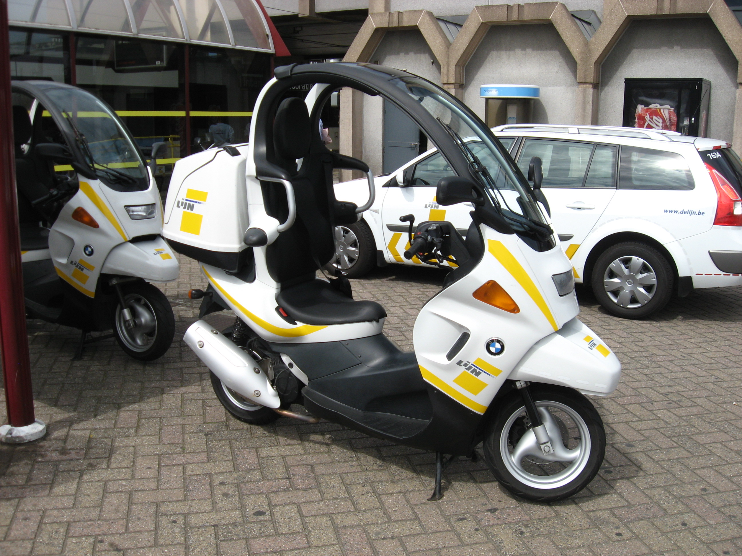 Motor in gebruik bij de lijn. Vermoedelijk om bij incidenten en/of informatievoorziening bij de haltes.